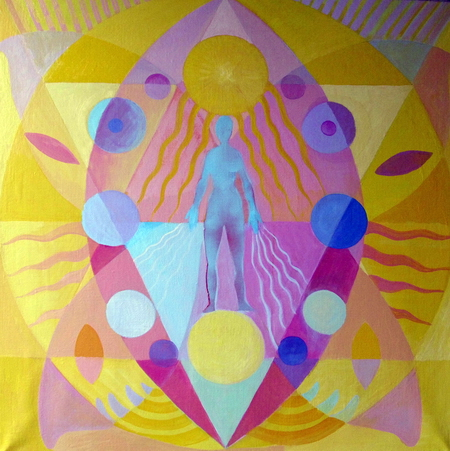 Dílo Miluše Poupětové